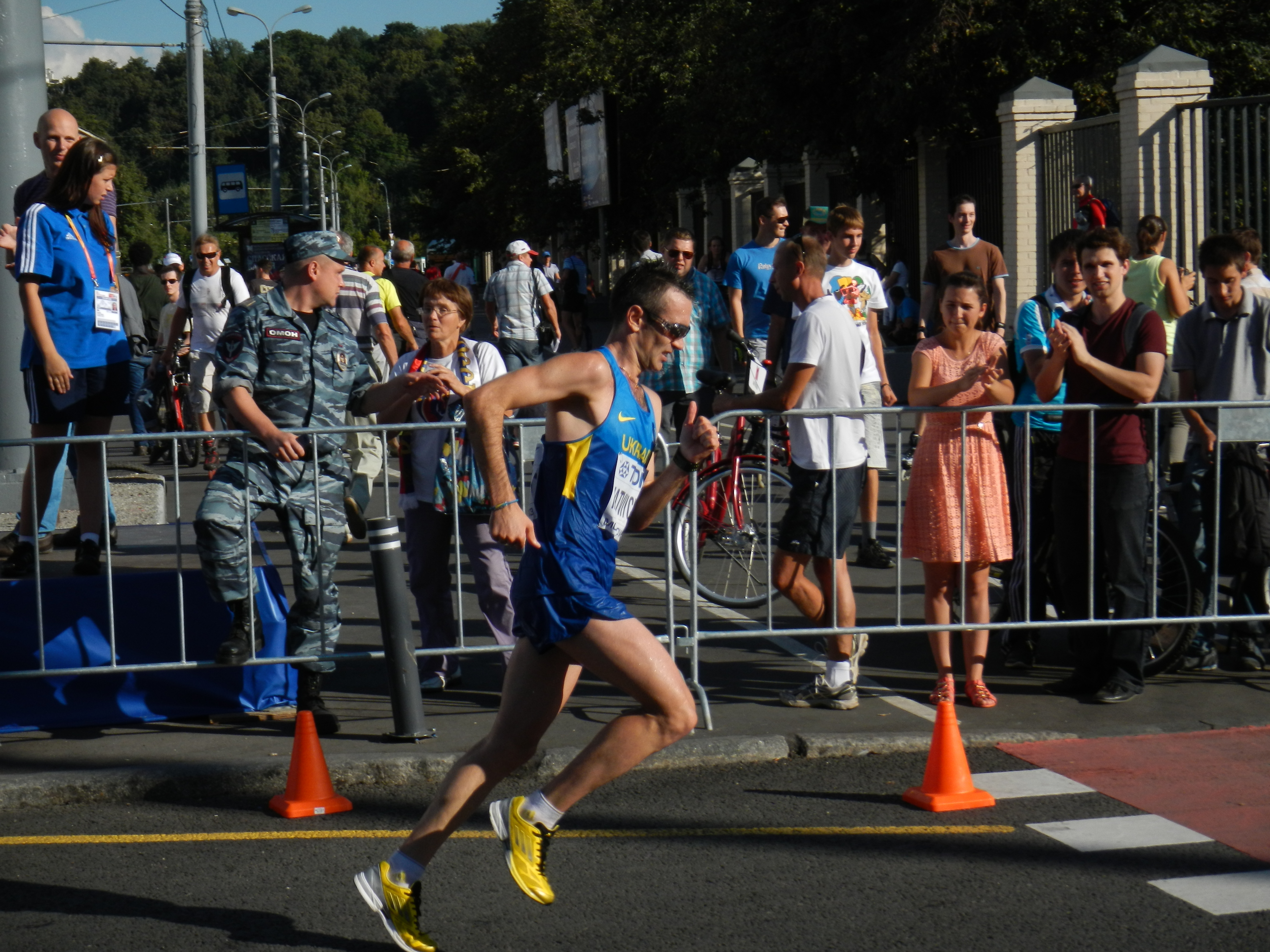 42 (1097) Vasil Matviychuk (Василий Матвийчук) (Ukraine) 2:26:21